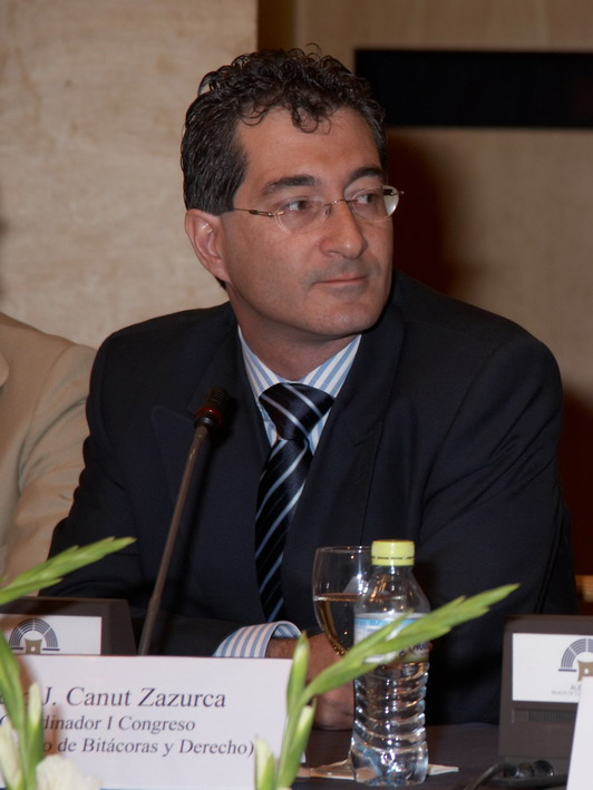 Pedro J. Canut